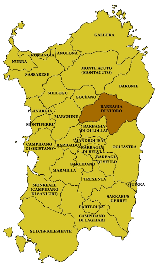 Sardinian Subregions